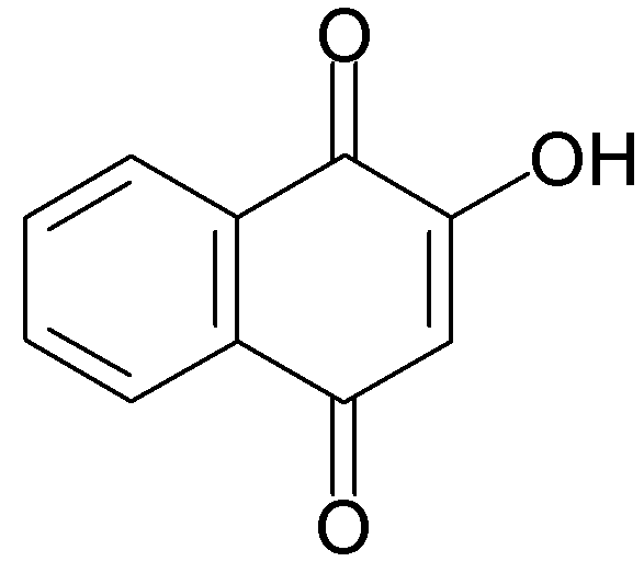 Lawsone